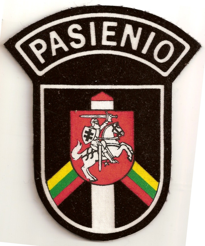 Lithuania BORDERpolice